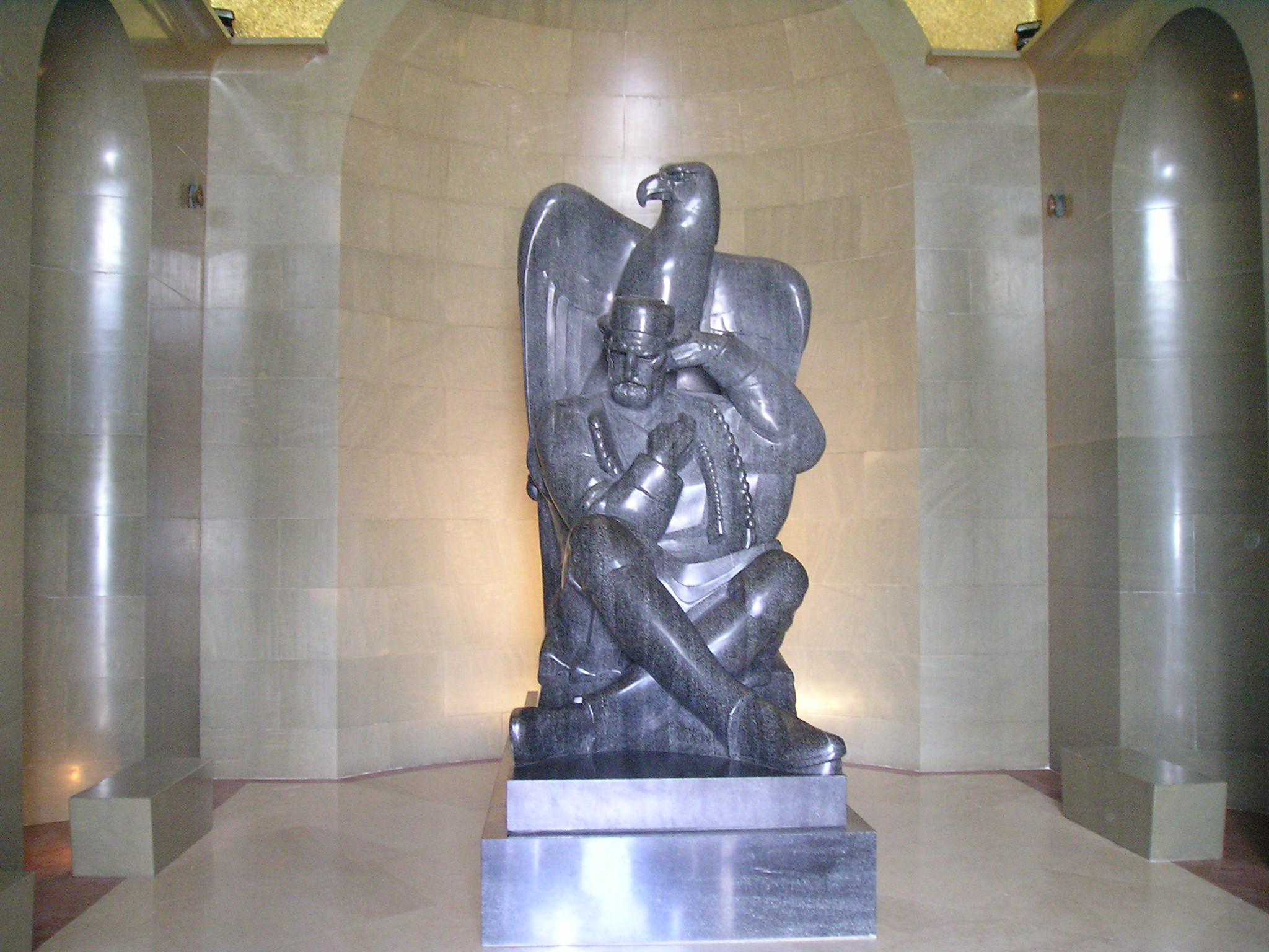 Njegoš Statue, Mausoleum at Lovćen, Montenegro